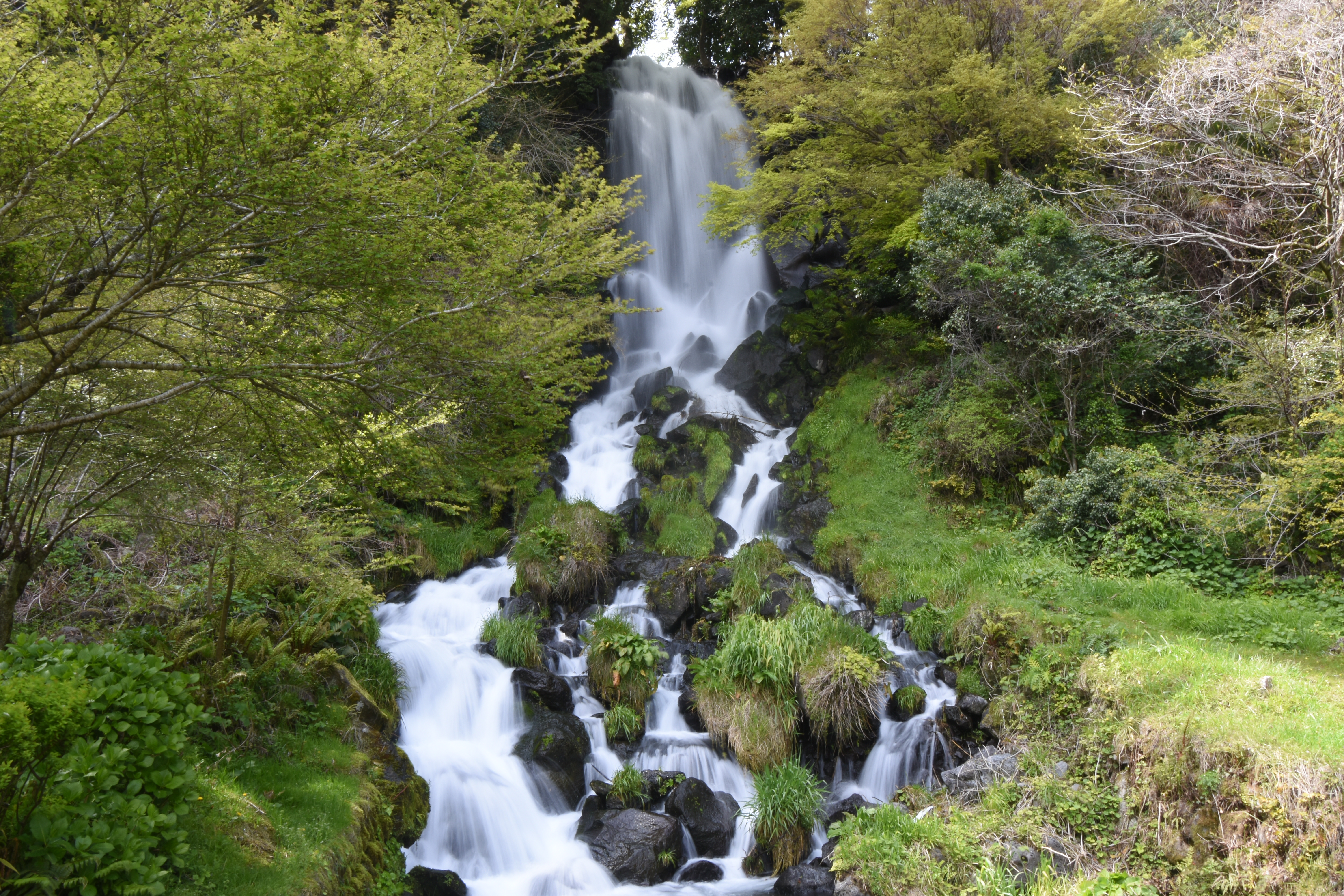 朝日滝（静岡県富士宮市半野、熊久保農村公園）、2020年4月15日撮影。